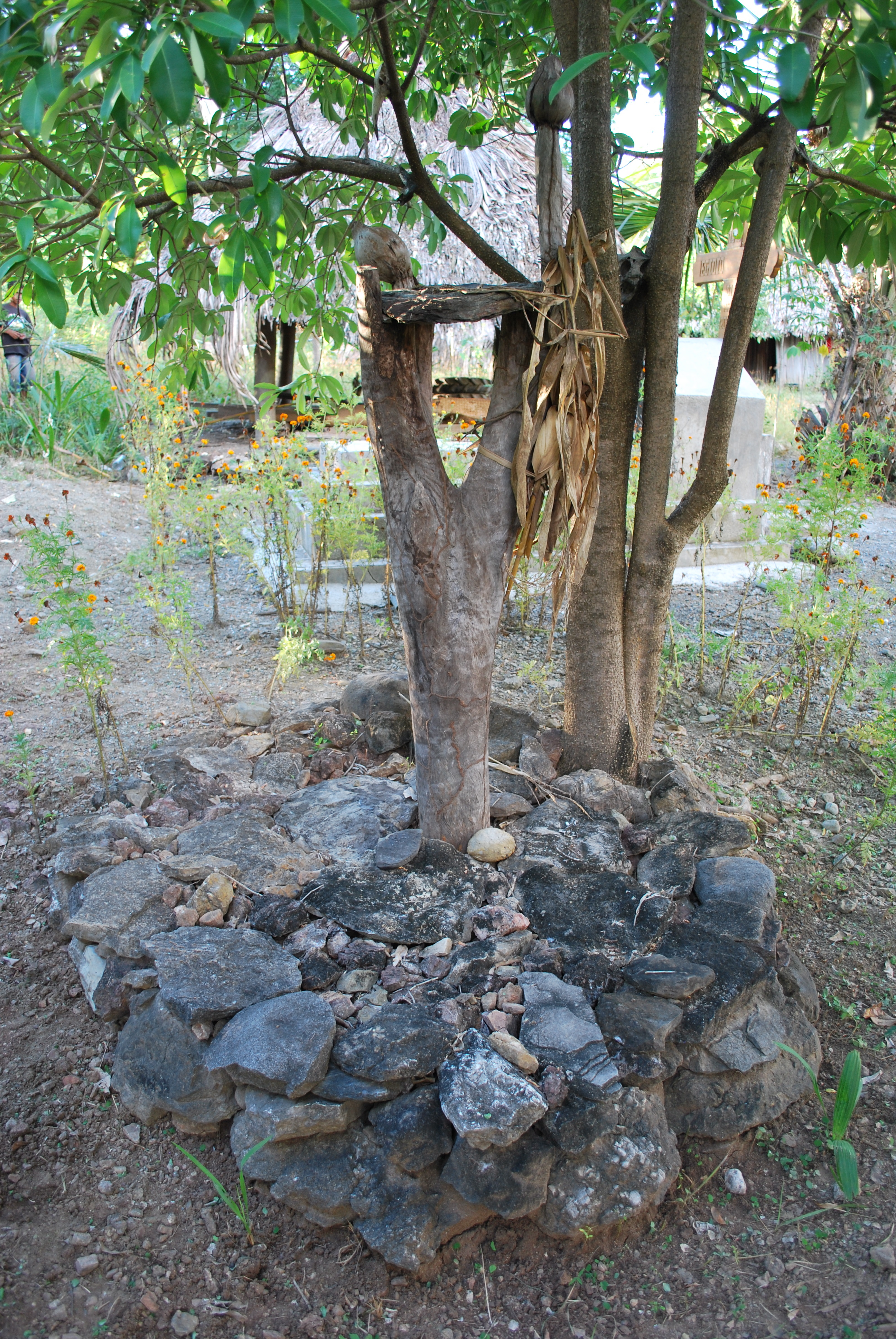 Heiliger Pfahl Ai To'os in Watu, Abani, Oecusse